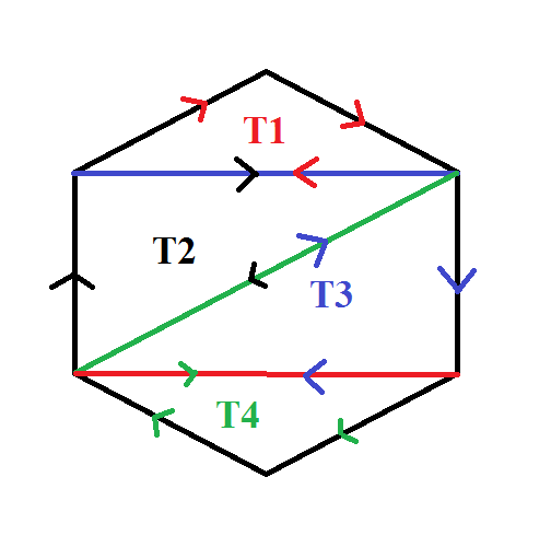 Polygone pour remarque dans Lemme de Goursat